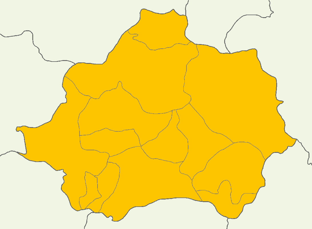 Kütahya'da 2014 Türkiye cumhurbaşkanlığı seçimi sonuçları